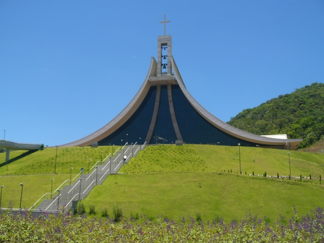 Santuario Madre Paulina em Nova Trento/SC